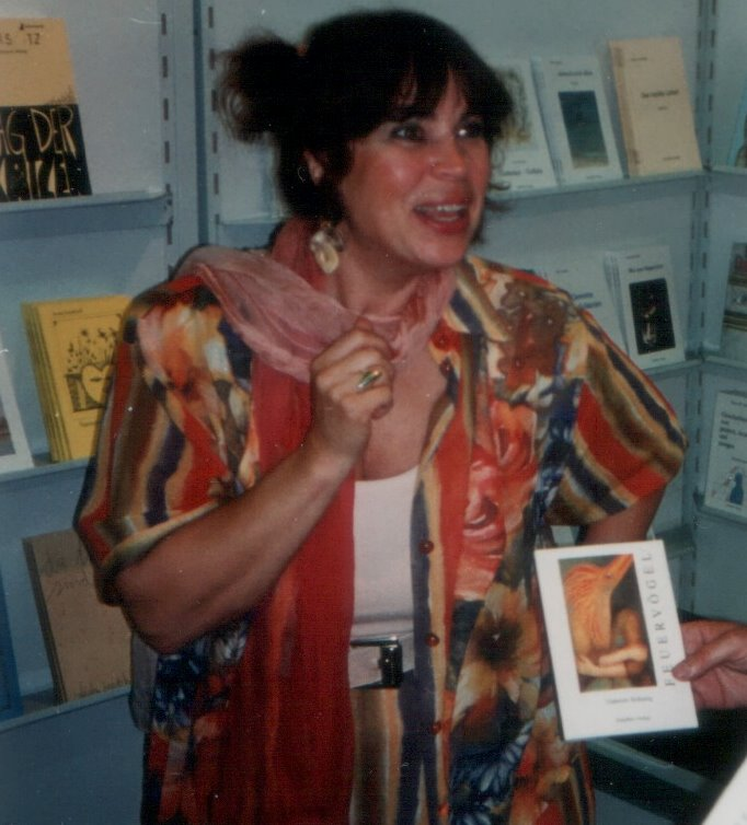 Gabriele Böhning stellt auf der Buchmesse Frankfurt ihr Buch Feuervögel vor (1995)